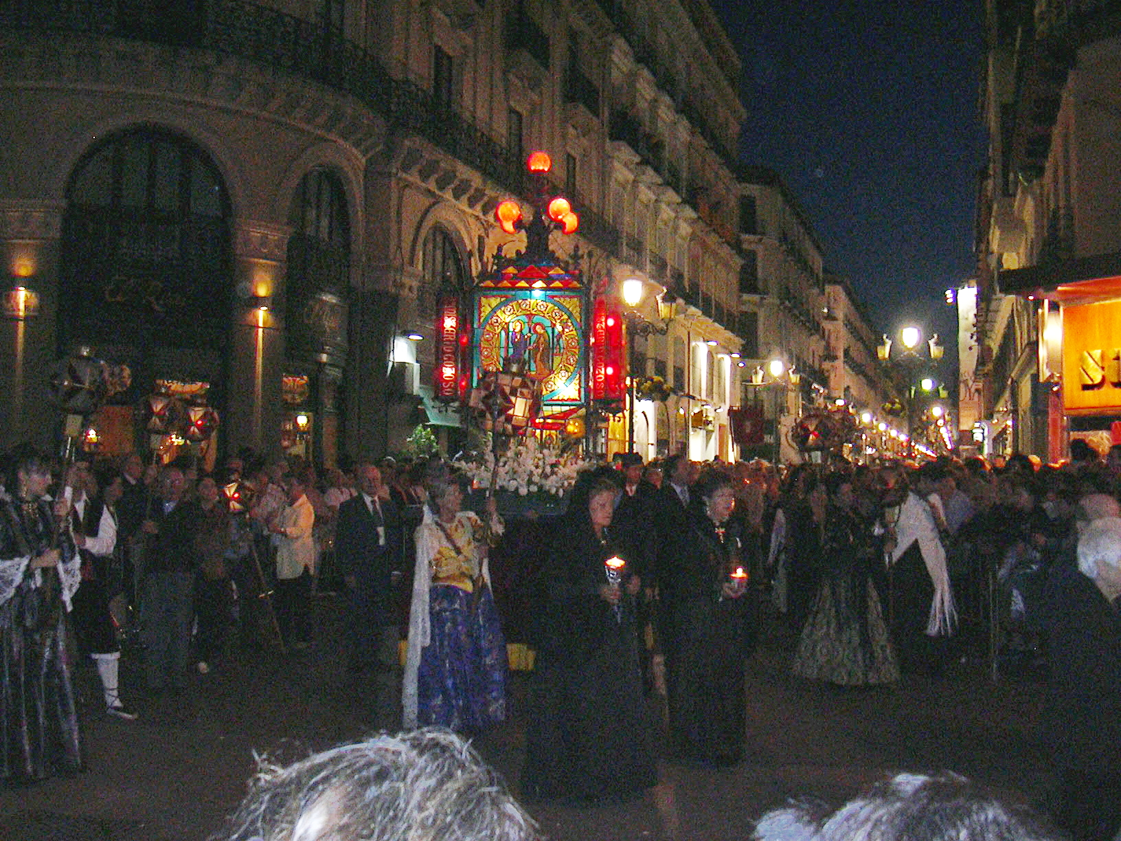 Rosario de Cristal - Fiestas del Pilar 2006 - Zaragoza (España)